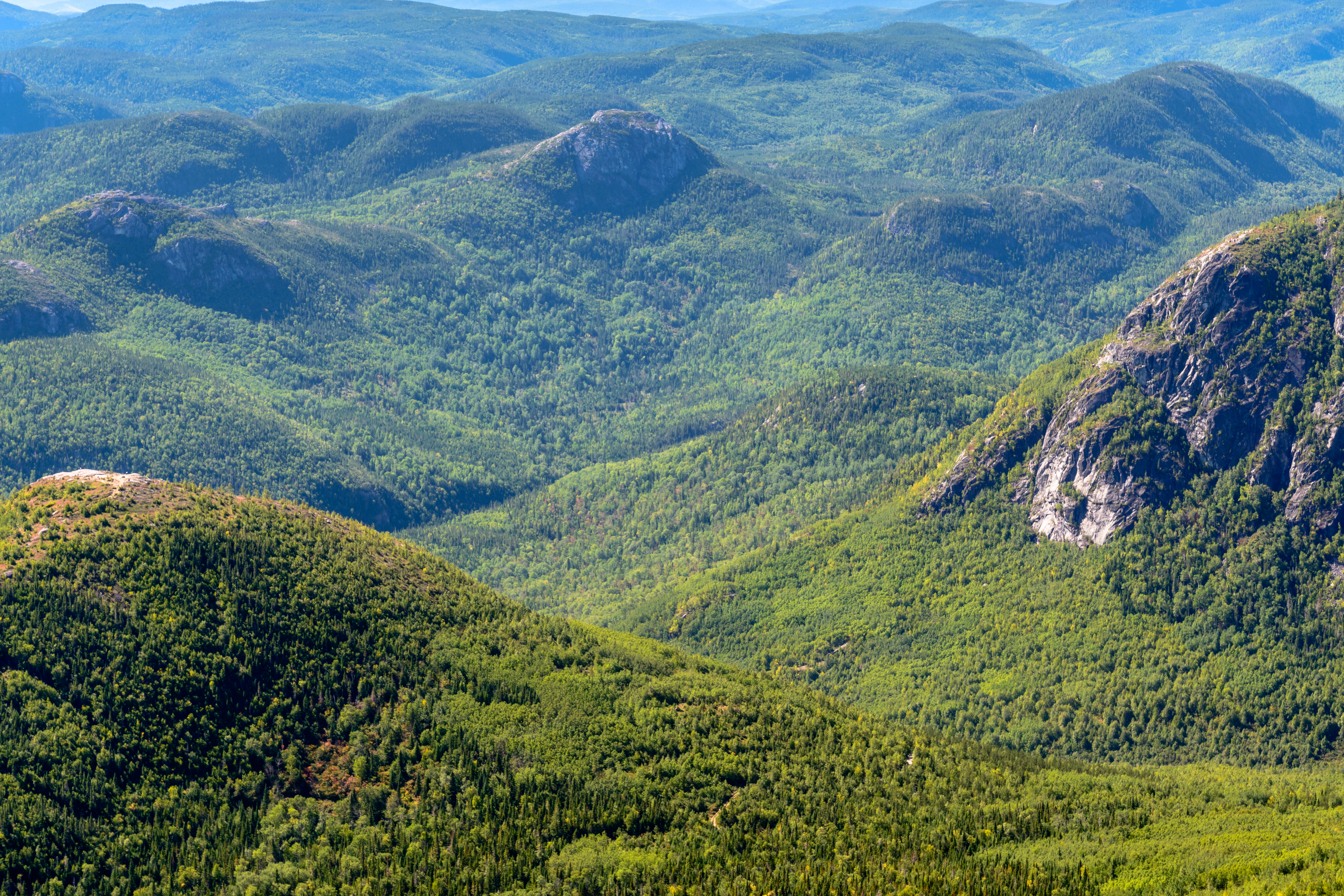 Parc national des Grands-Jardins, Canada